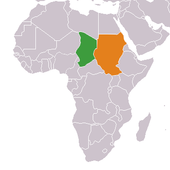 Chad & Sudan locator map